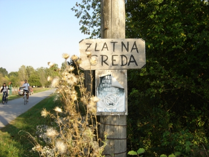 Zlatna Greda, naselje u Baranji